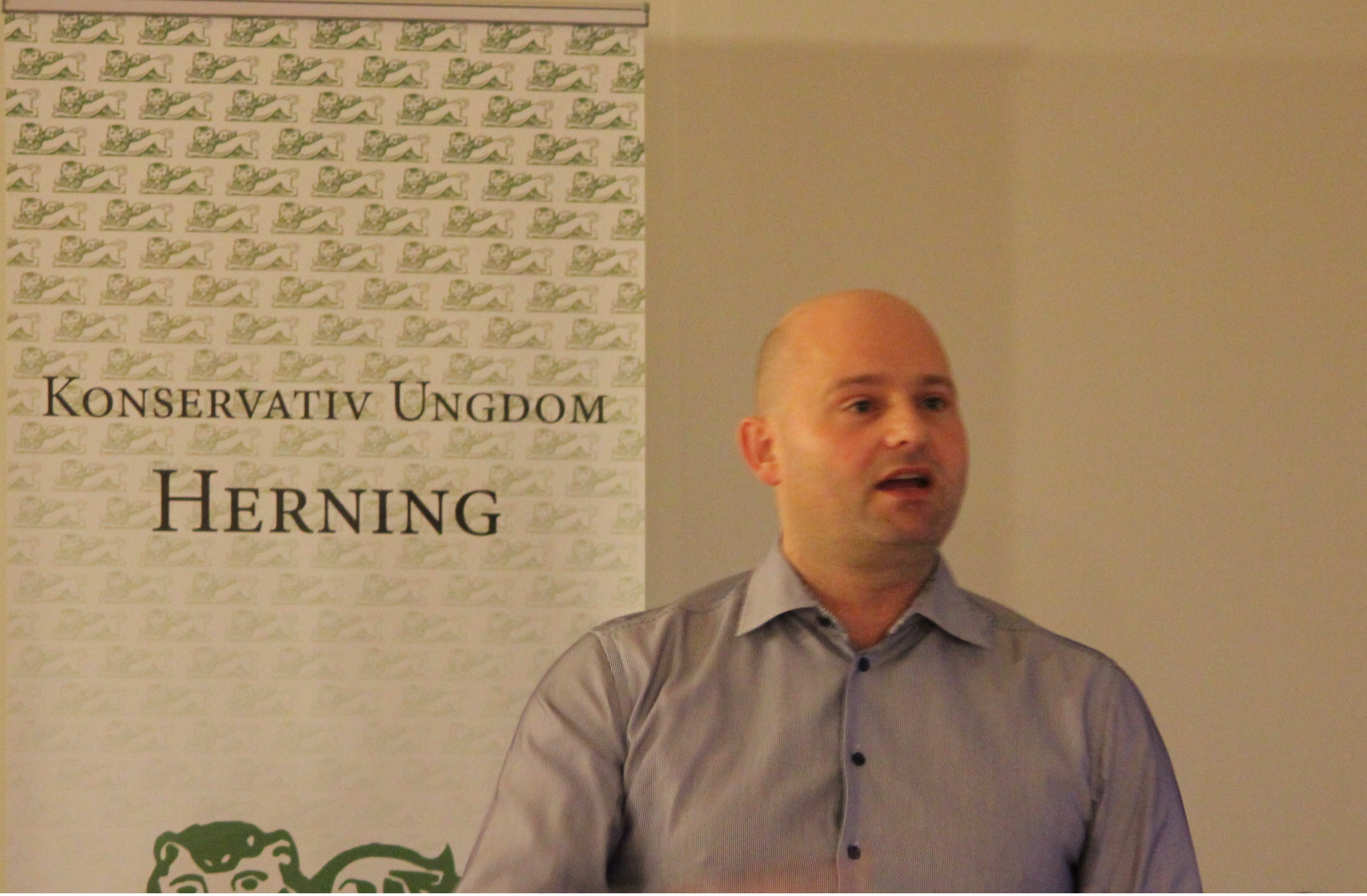 Søren Pape ved en debatarrangement i Herning 9. april 2015.